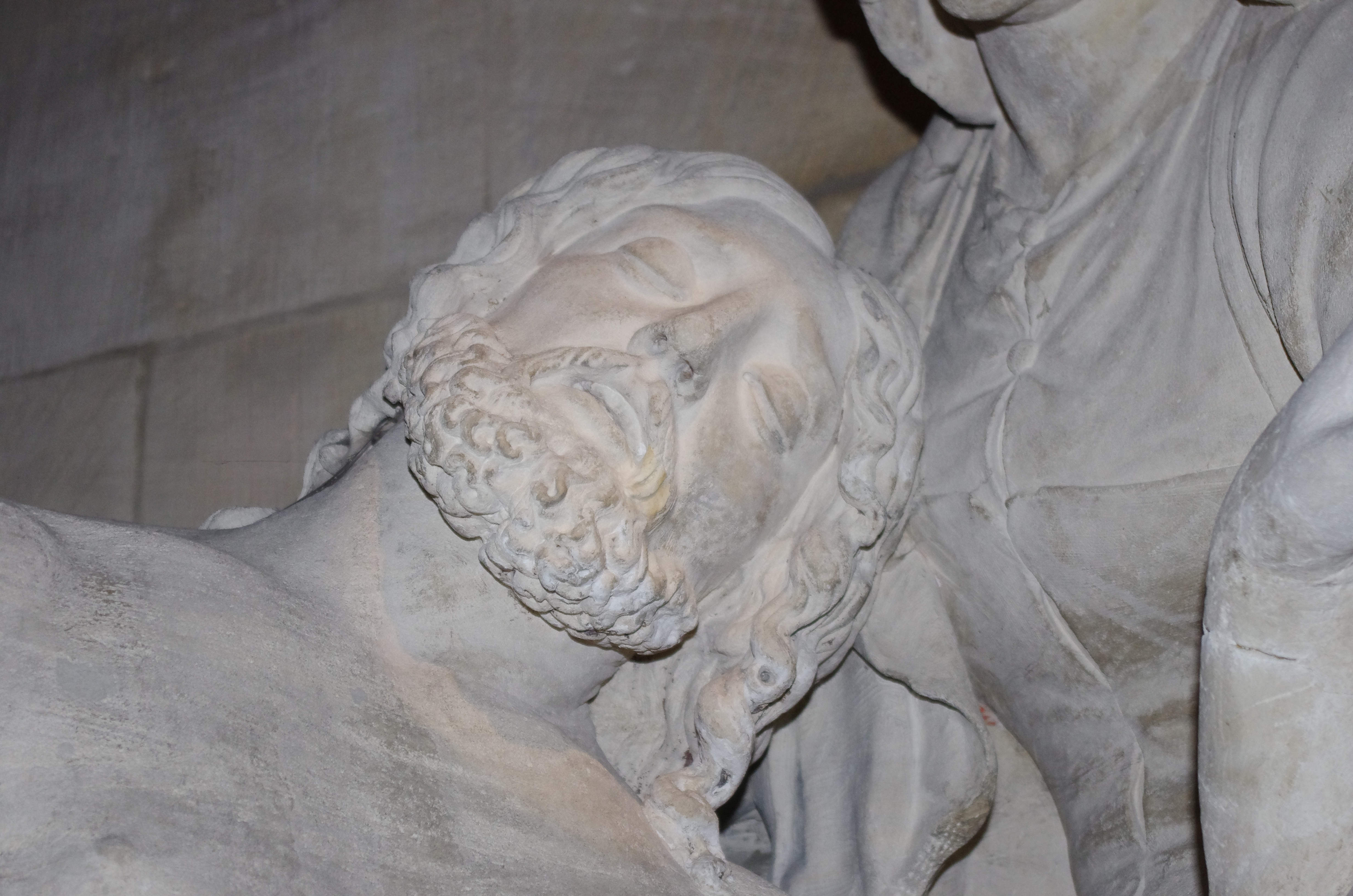 Étain im Department Meuse in Frankreich. Die Pieta stammt von Ligier Richier und befindet sich in der Kirche von Étain.